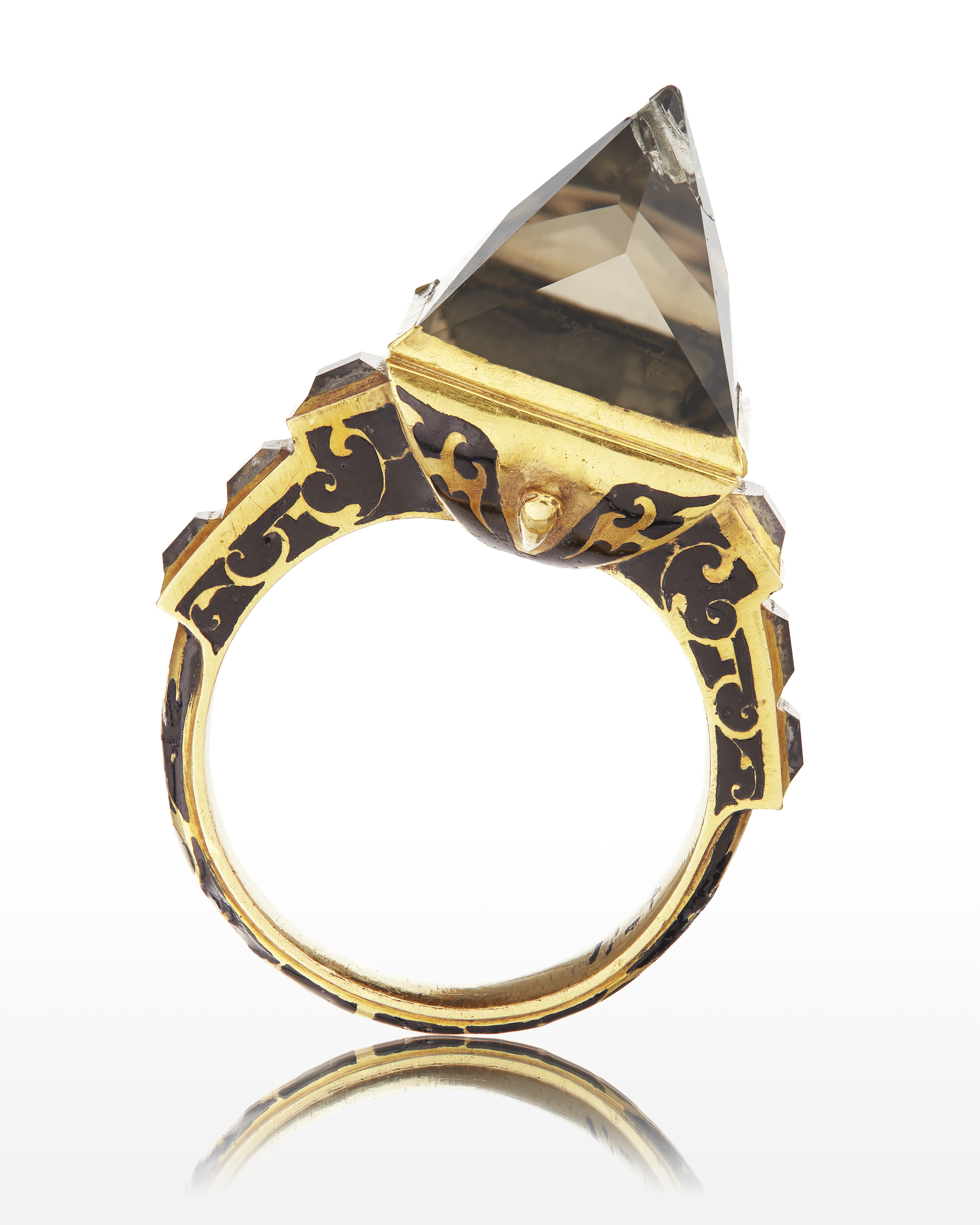 Ring av guld, nedre halvan med rundad utsida, täckt med beslagsornamentik av svart emalj och guld. Övre halvan med fyrkantig utsida, i mitten fattat en pyramidformig, ljus rökkvarts(?), slät fattning av guld, undersidan stympat pyramidformig med rundade sidor, groteskornamentik av svart emalj och guld. Stenen flankerad av sex taffelslipade bergkristaller i slät guldfattning, kanterna med groteskornamentik av svart emalj och guld. Nyckelord: 1600-tal, Ring, Smycke, Kröningsring, Rökkvarts, Föremålsbild